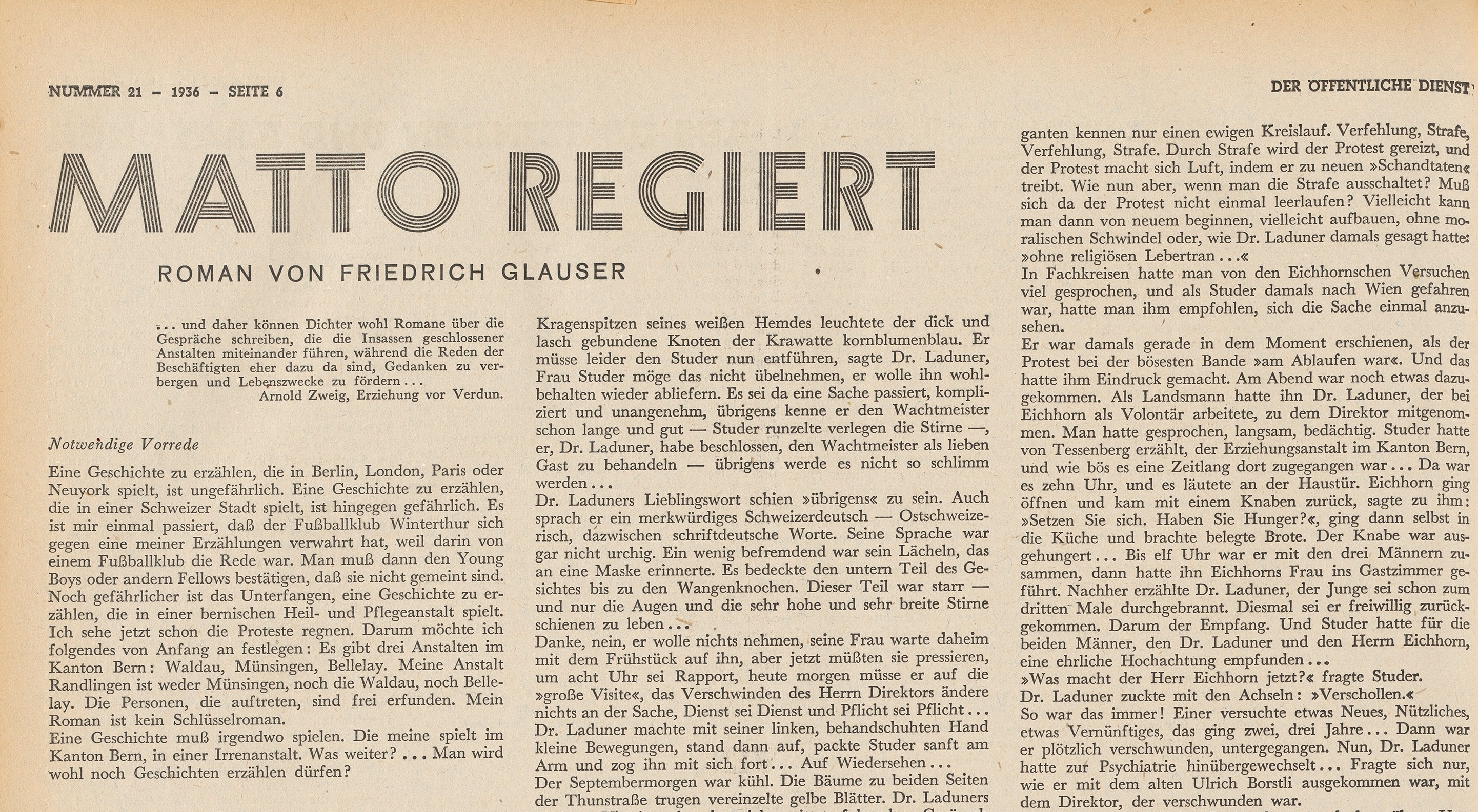 Erstruck von "Matto regiert". Ausschnitt aus "Der öffentliche Dienst" Nr. 21, vom 22. Mai 1936